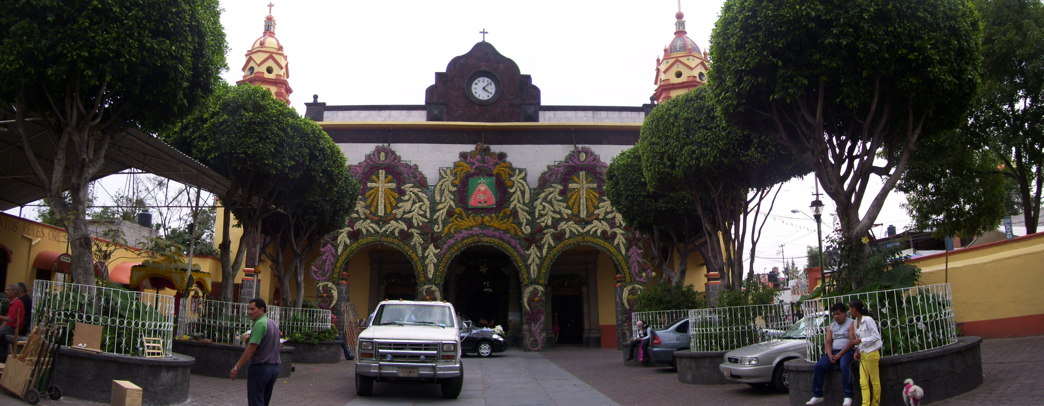 Templo de los Santos Reyes